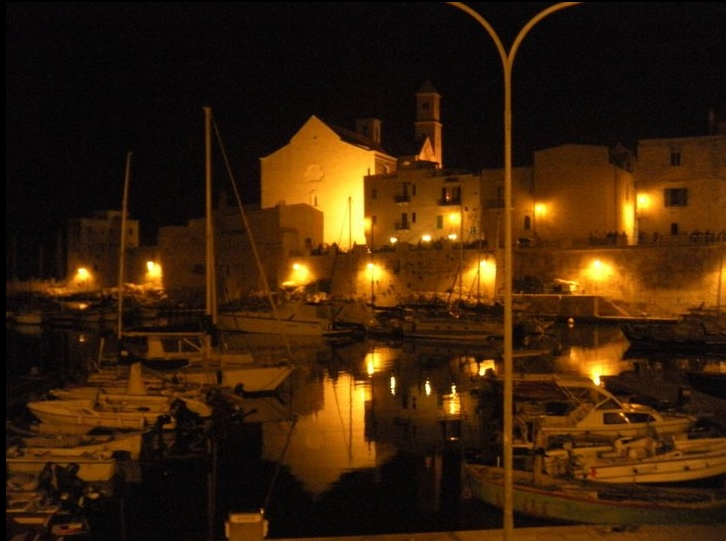 rasky, opera propria, Giovinazzo di sera